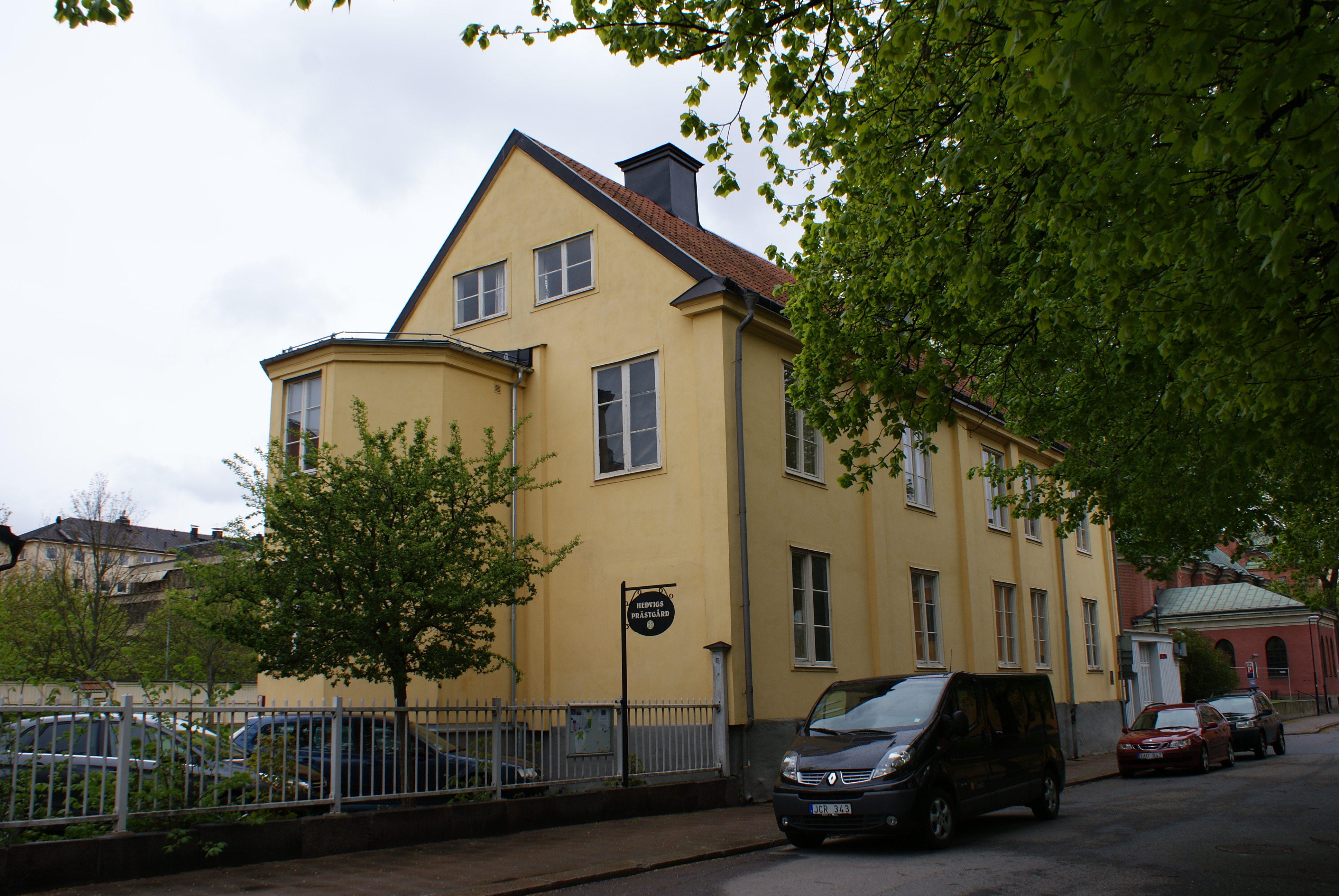 Hedvigs prästgård - bostadshus in Norrköping